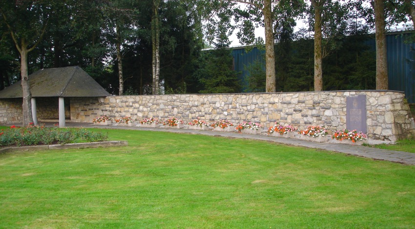 Malmedy massacre memorial Baugnez